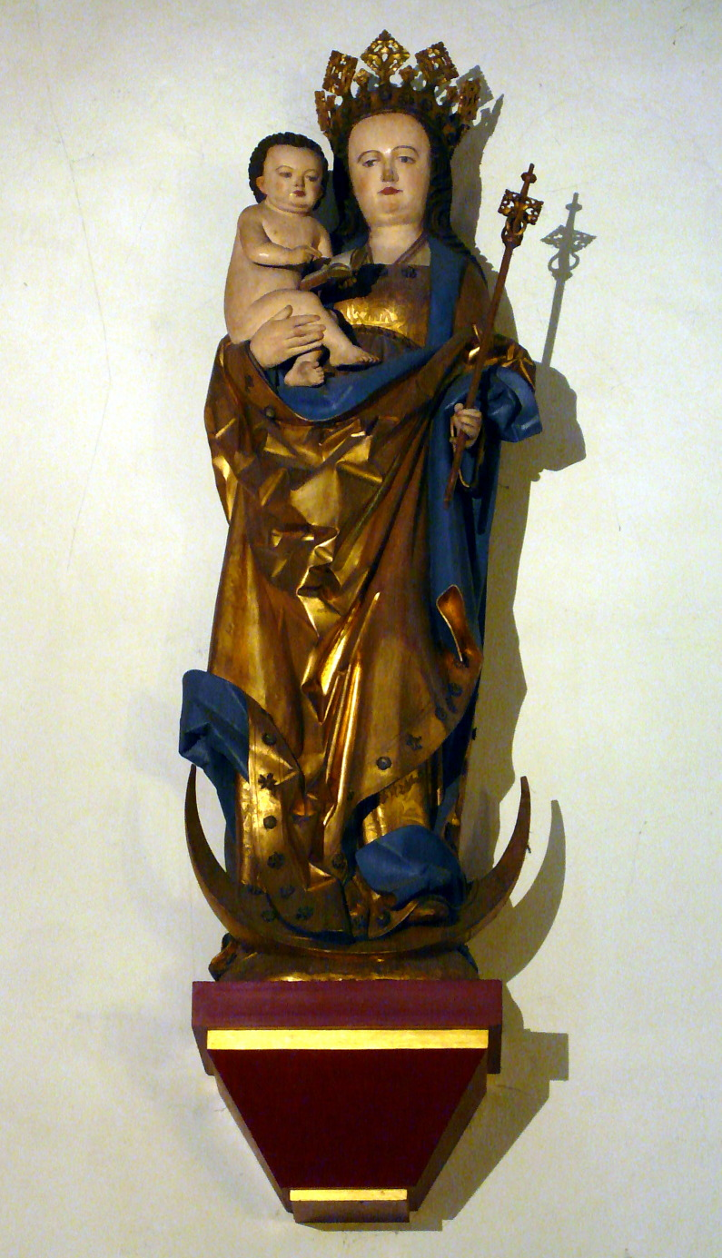 Madonna auf der Mondsichel im Seitenschiff der St. Marien-Kirche in Göttingen, ehemals Hauptfigur des Altars, geschaffen 1524 von Bartold Kastrop